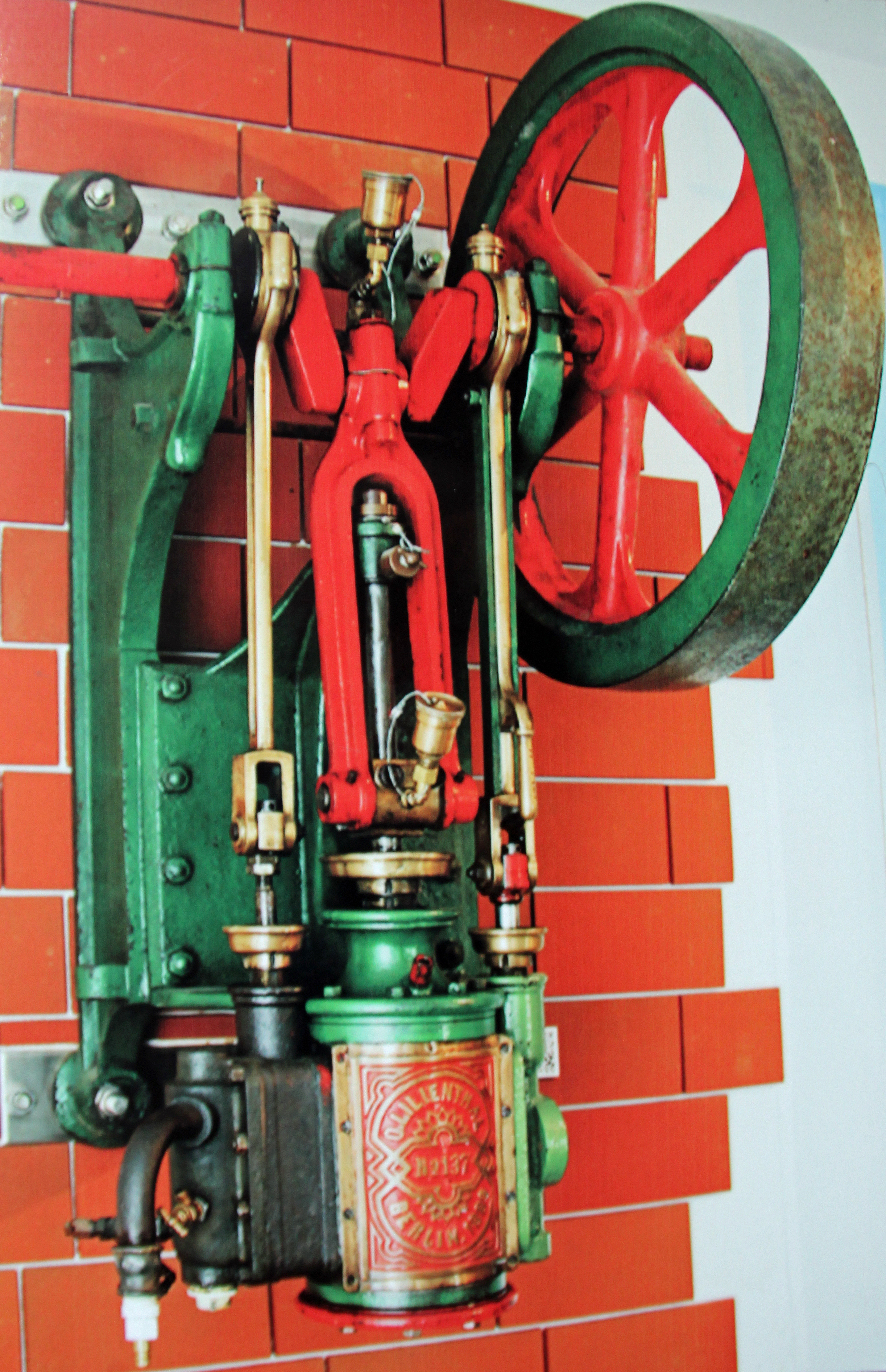 Dampfmaschine Nr. 137 der Maschinenfabrik O. Lilienthal, Berlin, 1889 (Exponat im Otto-Lilienthal-Museum, Anklam)